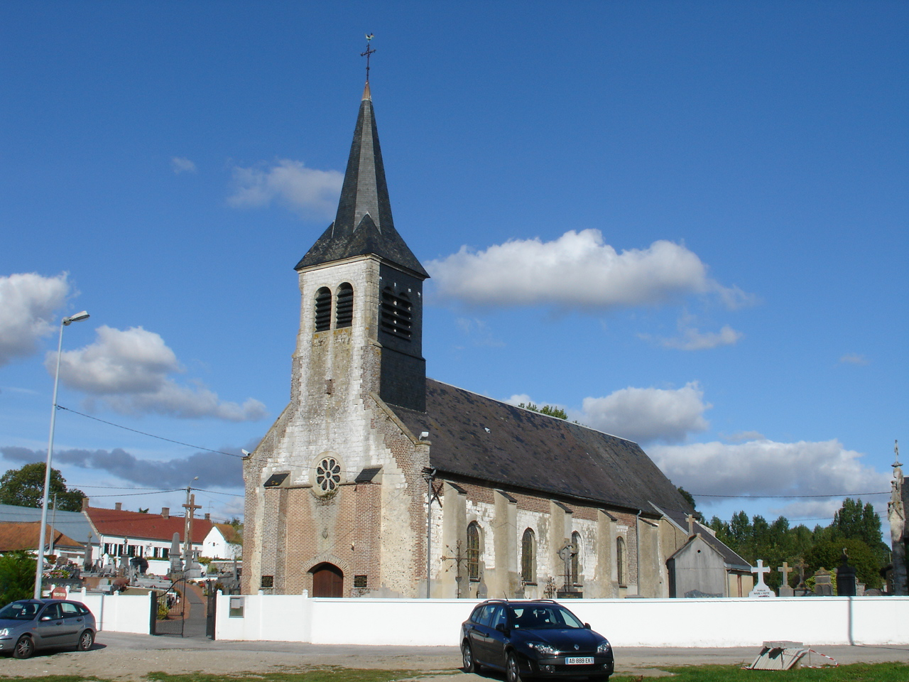 Église de Conchil-le-Temple